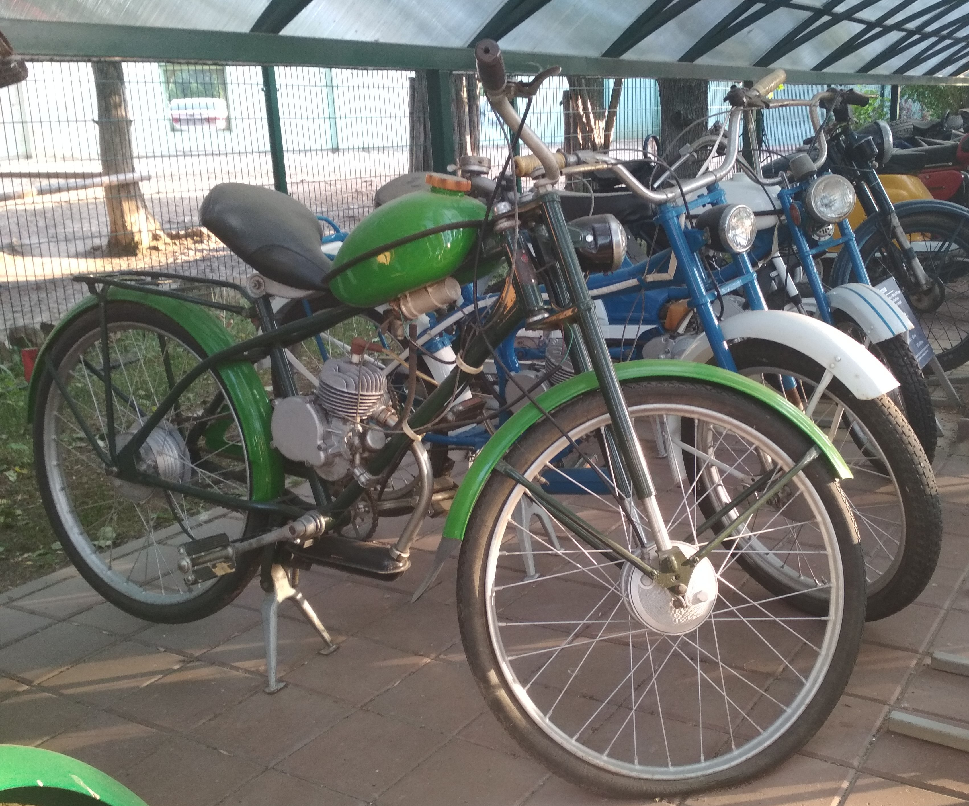 Советский мопед Рига-4 в коллекции Нижегородского зоопарка "Лимпопо"